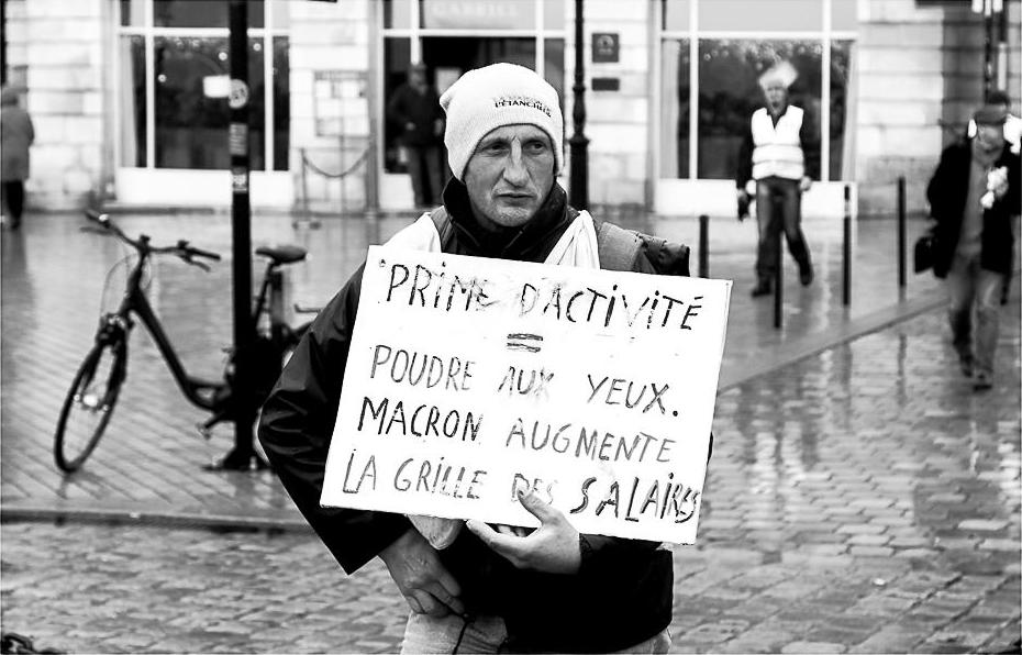 Les Gilets Jaunes